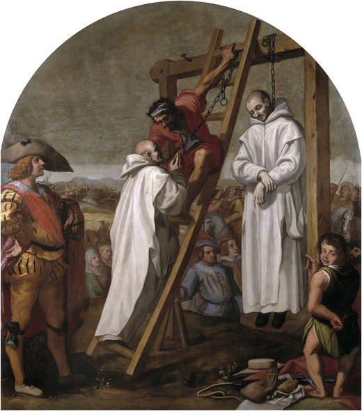 Martirio de los padres John Rochester y James Walworth.label QS:Les,"Martirio de los padres John Rochester y James Walworth."